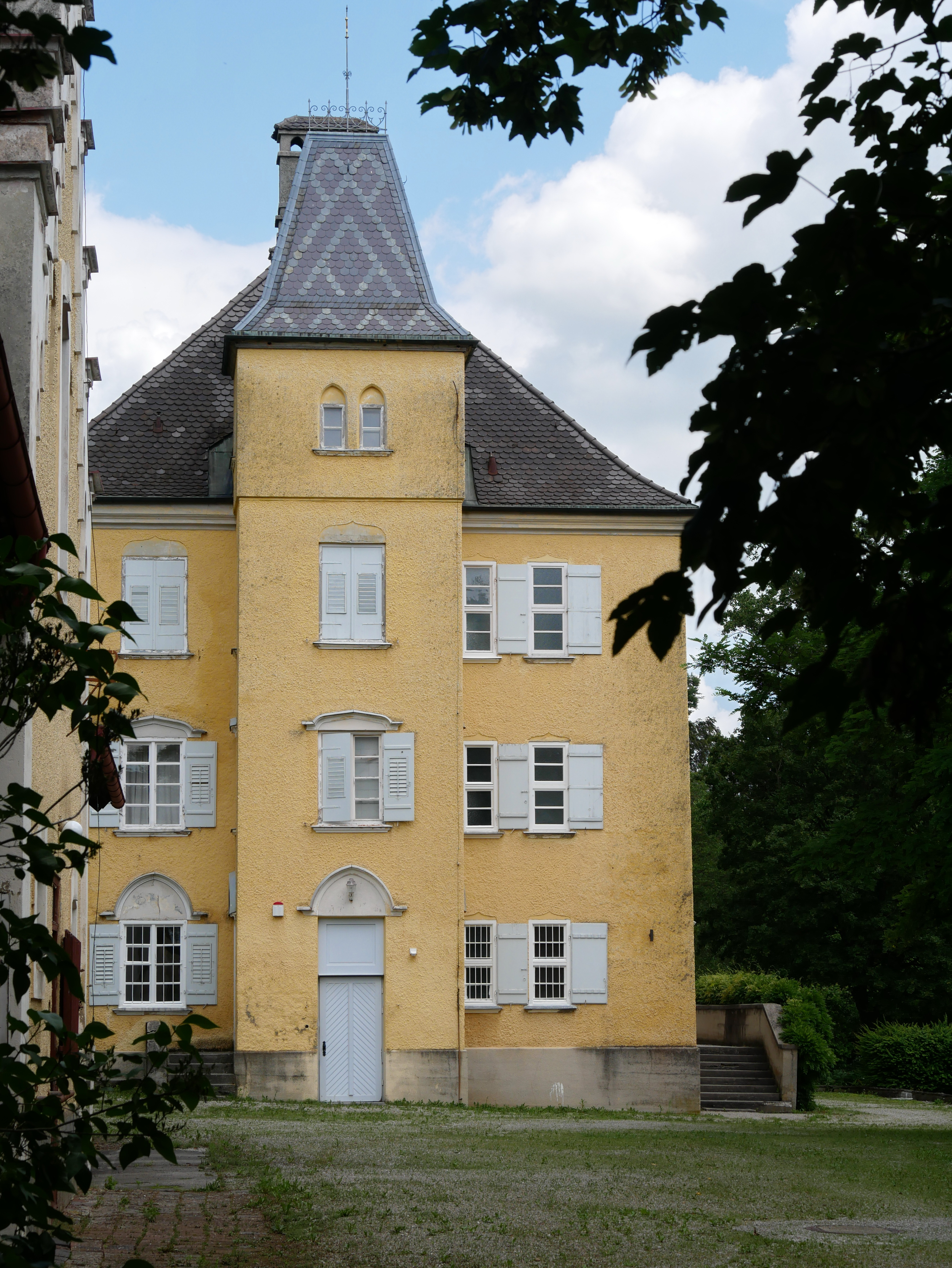 Mammendorf, Ortsteil Nannhofen, Karl-von-Lotzbeck-Str,2: Schloß Nannhofen, hier: Turm an der Westfassade, entstanden um 1752